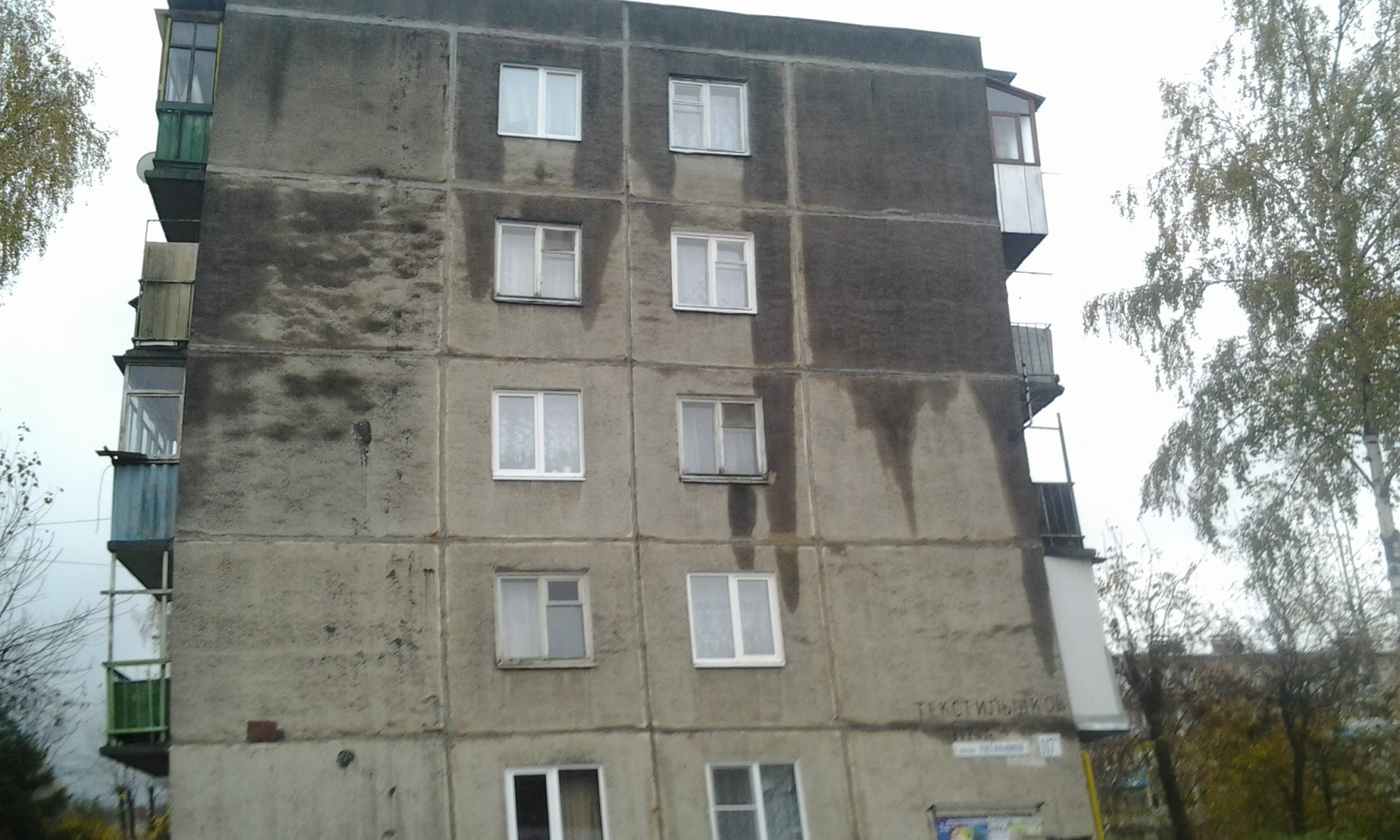 Дом на проспекте Текстильщиков после дождя